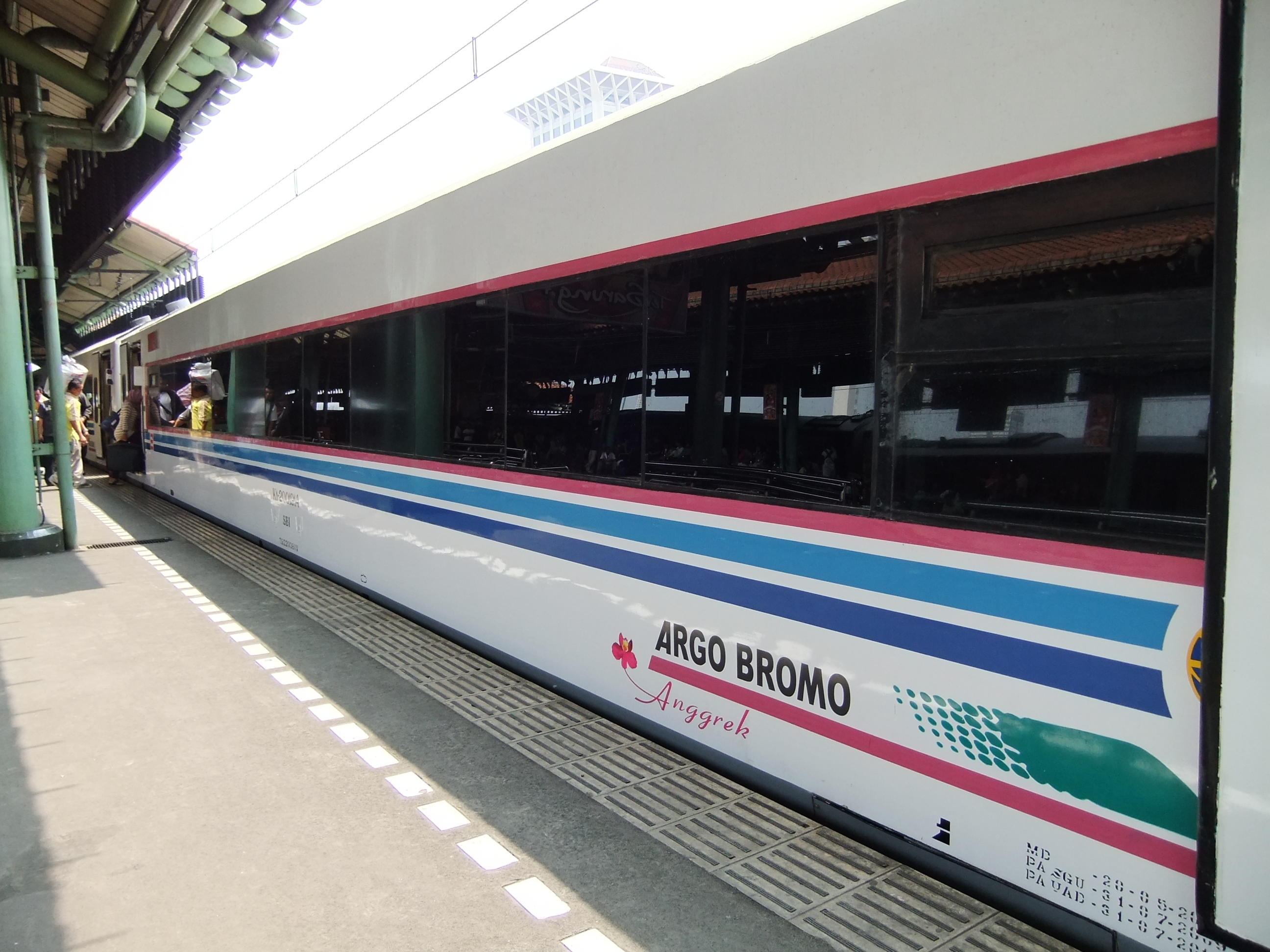 Argo Bromo Anggrek Siang